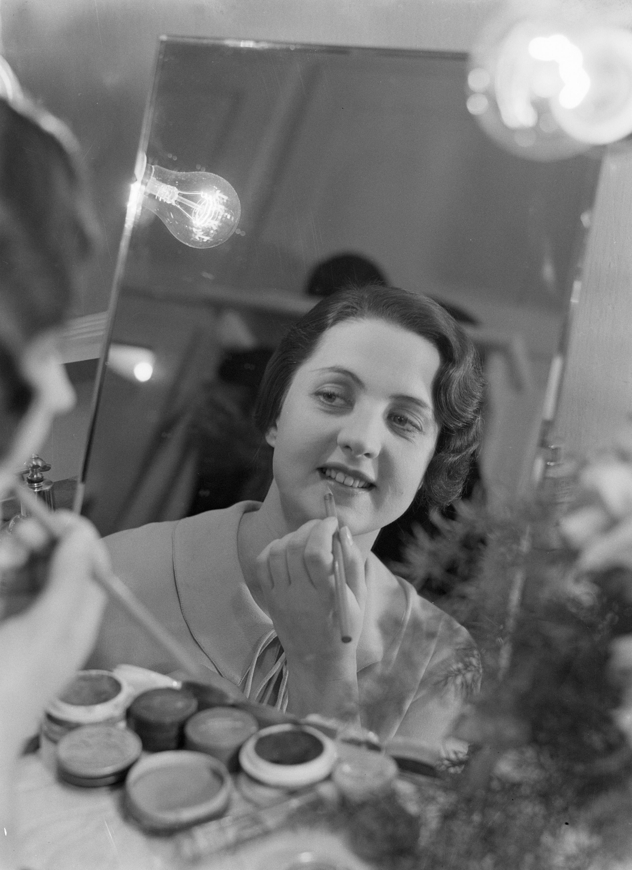 Collectie / Archief : Fotocollectie Van de Poll Reportage / Serie : Reis naar Polen Beschrijving : Portret van de Poolse actrice Jadwiga Smosarska in de kleedkamer van het Teatr Polski terwijl ze zich opmaakt voor een optreden Annotatie : Jadwiga Smosarska (1898 –1971) kreeg o.a. bekendheid door haar optreden als actrice in Poolse films tijdens het interbellum Datum : 1934 Locatie : Polen, Warschau Trefwoorden : acteurs, portretten, schouwburgen Persoonsnaam : Smosarska, Jadwiga Fotograaf : Poll, Willem van de Auteursrechthebbende : Nationaal Archief Materiaalsoort : Glasnegatief Nummer archiefinventaris : bekijk toegang 2.24.14.02 Bestanddeelnummer : 190-1236